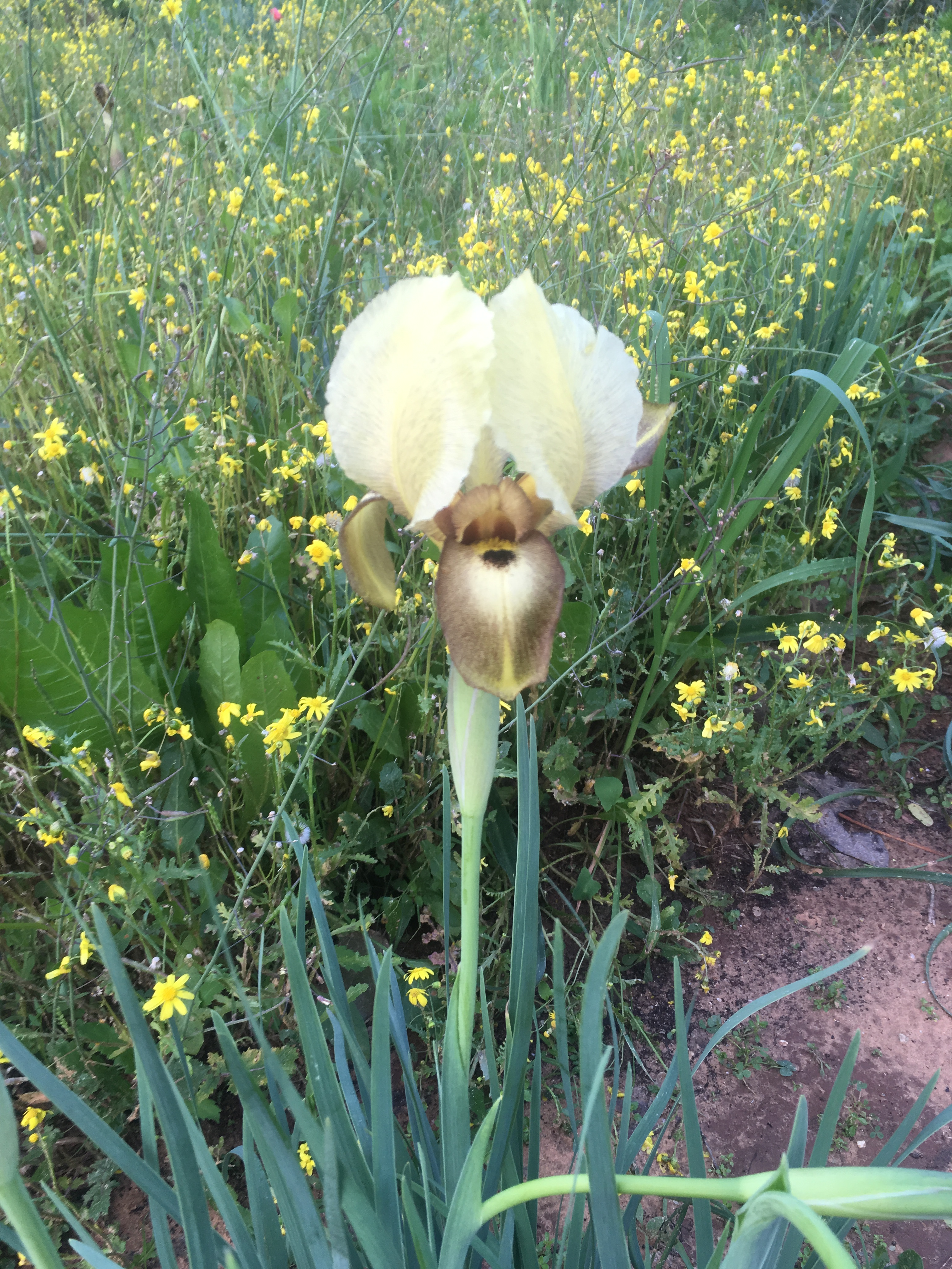 "אירוס העידן"- מוטציה של אירוס הארגמן